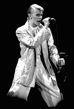 David Bowie, Ekeberghallen, Oslo, Norway